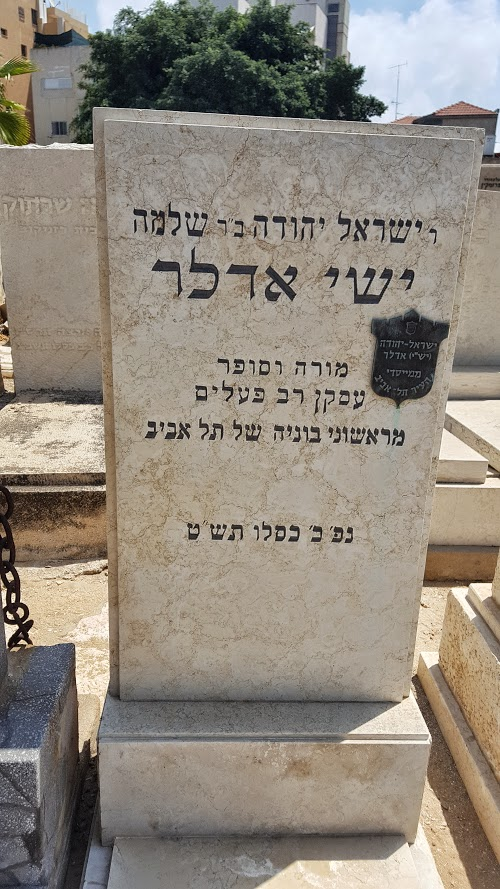 קברו של ישראל יהודה-ישי אדלר,מורה וסופר, מראשוני בוניה של תל אביב בבית העלמין טרומפלדור בתל אביב .צילום: אלי אלון